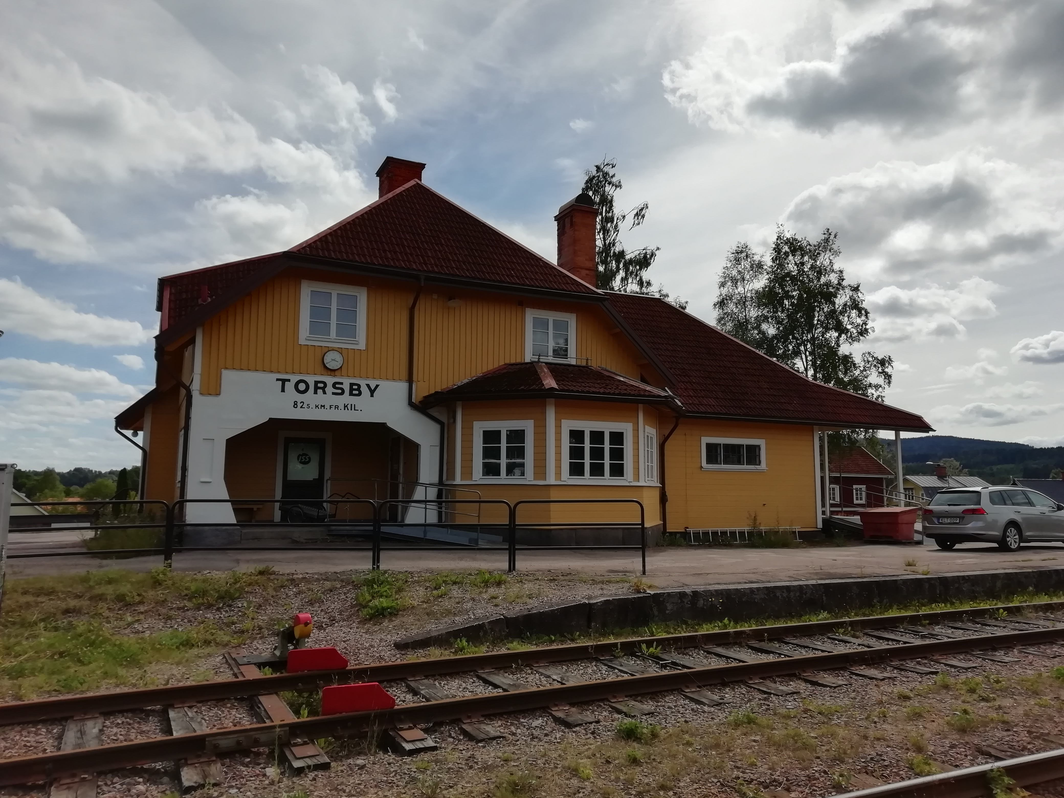 Järnvägsstationen i Torsby